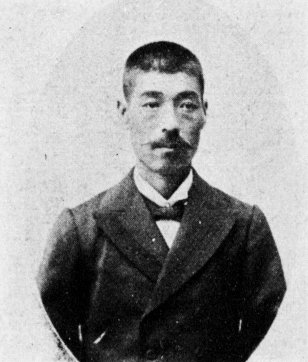 山森隆（1858-1929）